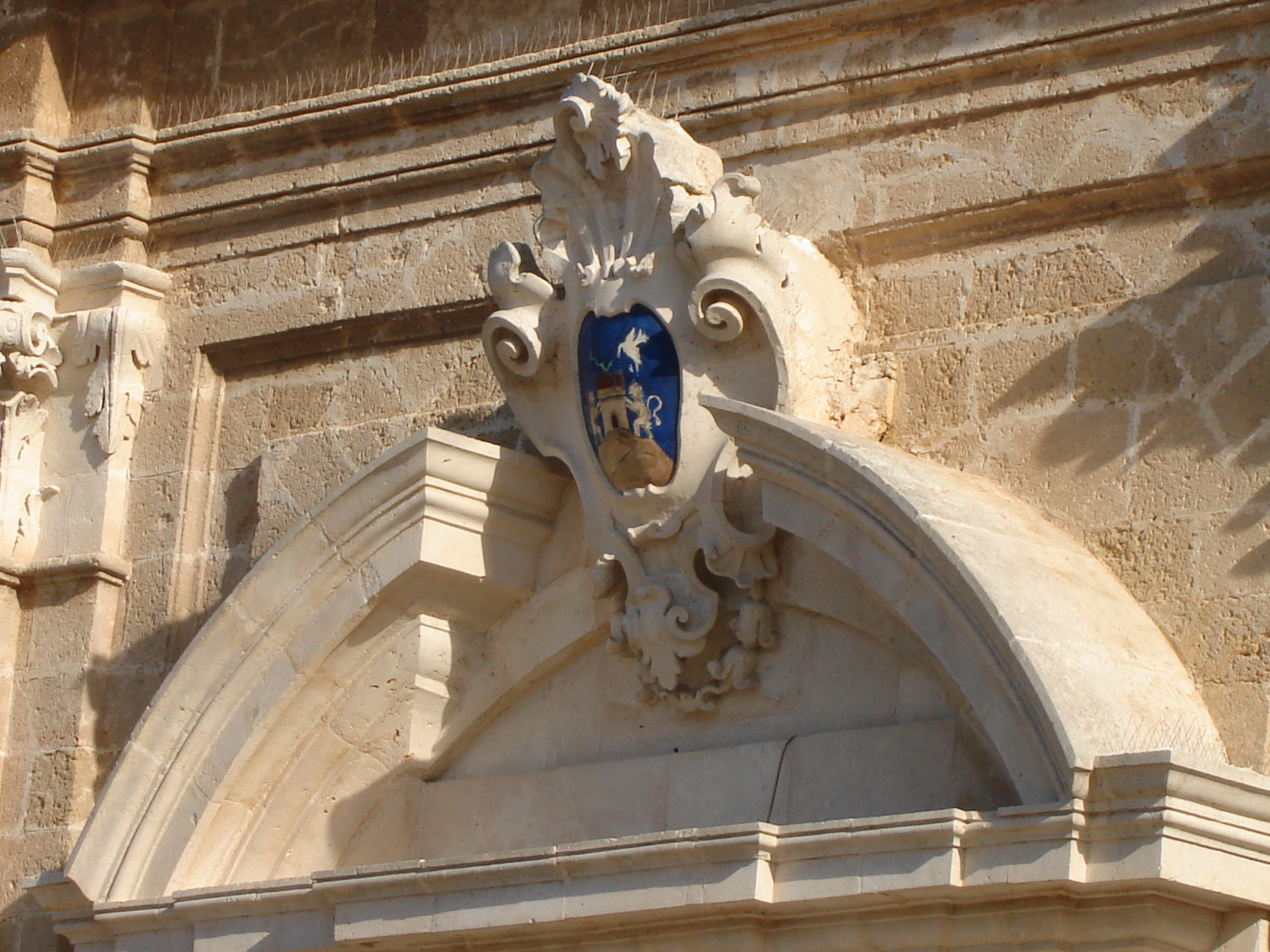 Particolare della facciata della Basilica di Oria; si noti in alto lo stemma cittadino.